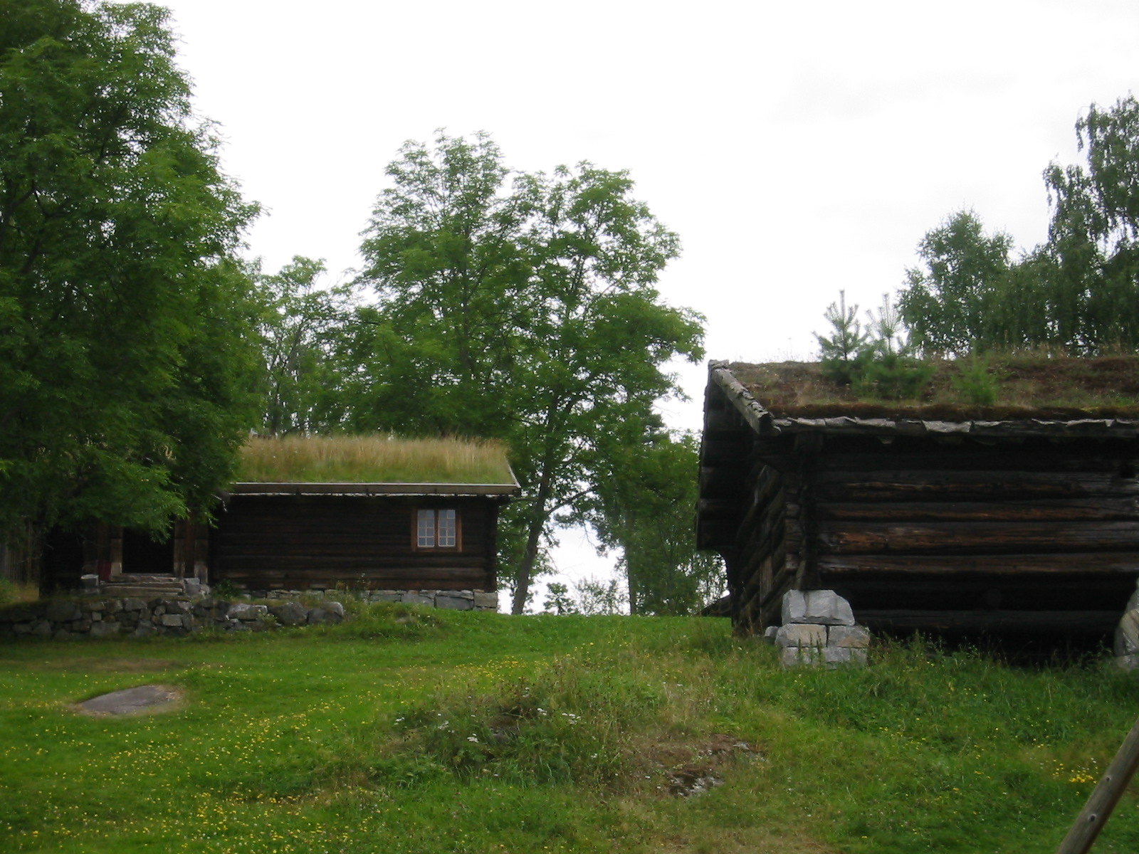 Lågdalsmuseet, Kongsberg, Norway August 2003 Author: Kjetil Bjørnsrud